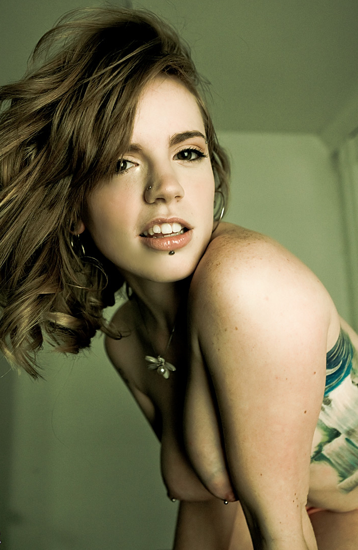 Labret-, Nostril und Brustwarzenpiercings